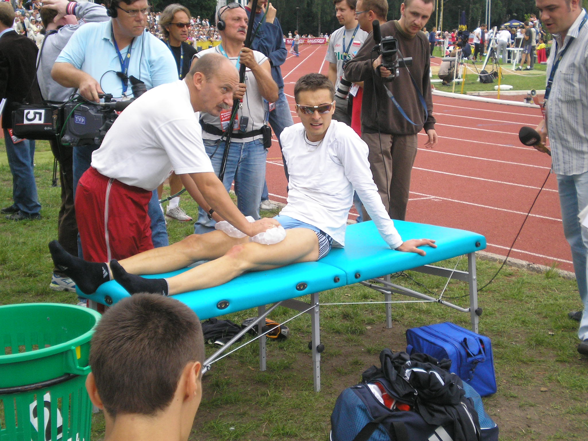 Marek Plawgo z masażystą po biegu MP w LA Poznań 2007